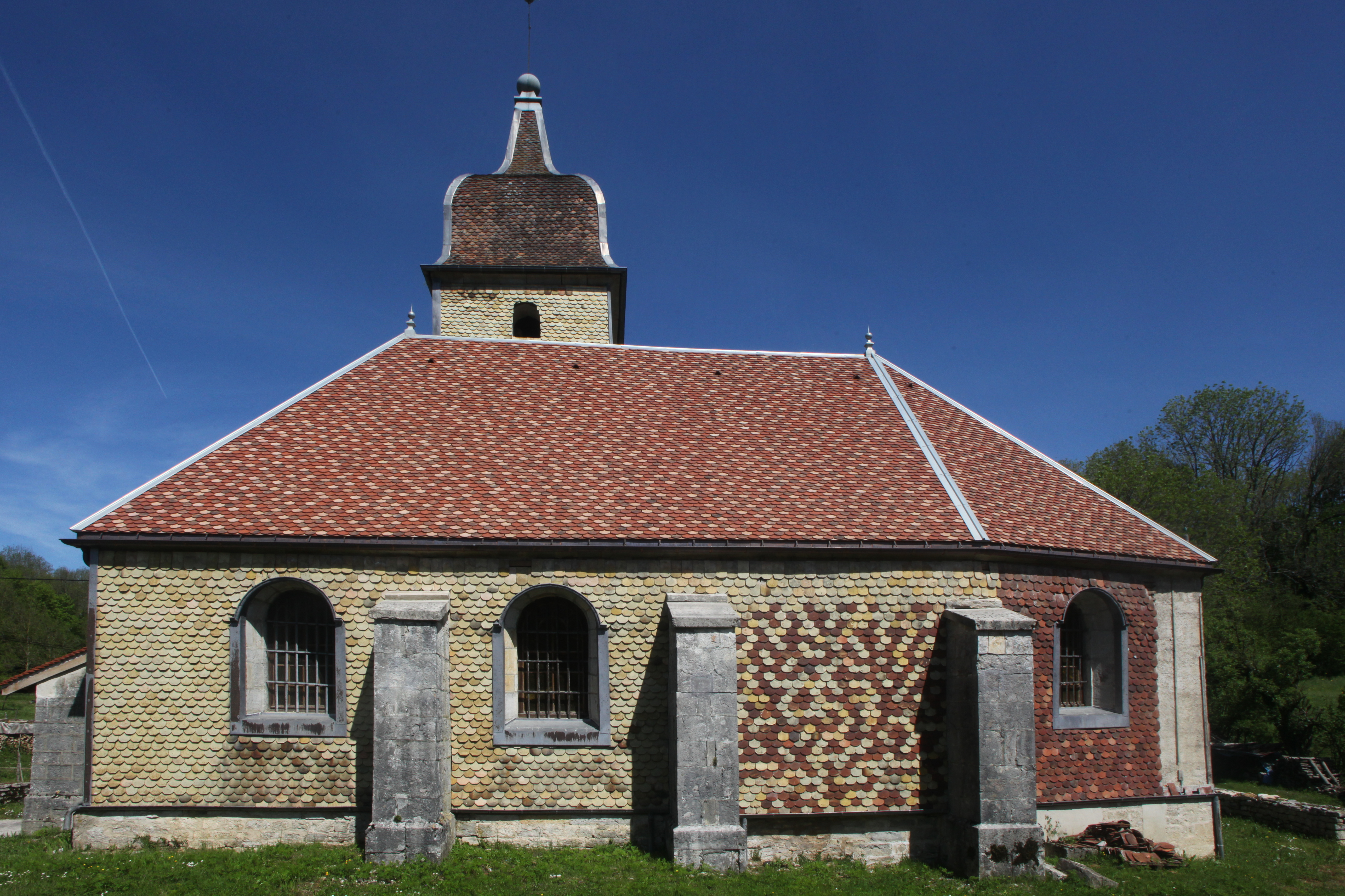 Eglise de Sainte-Anne (Doubs).